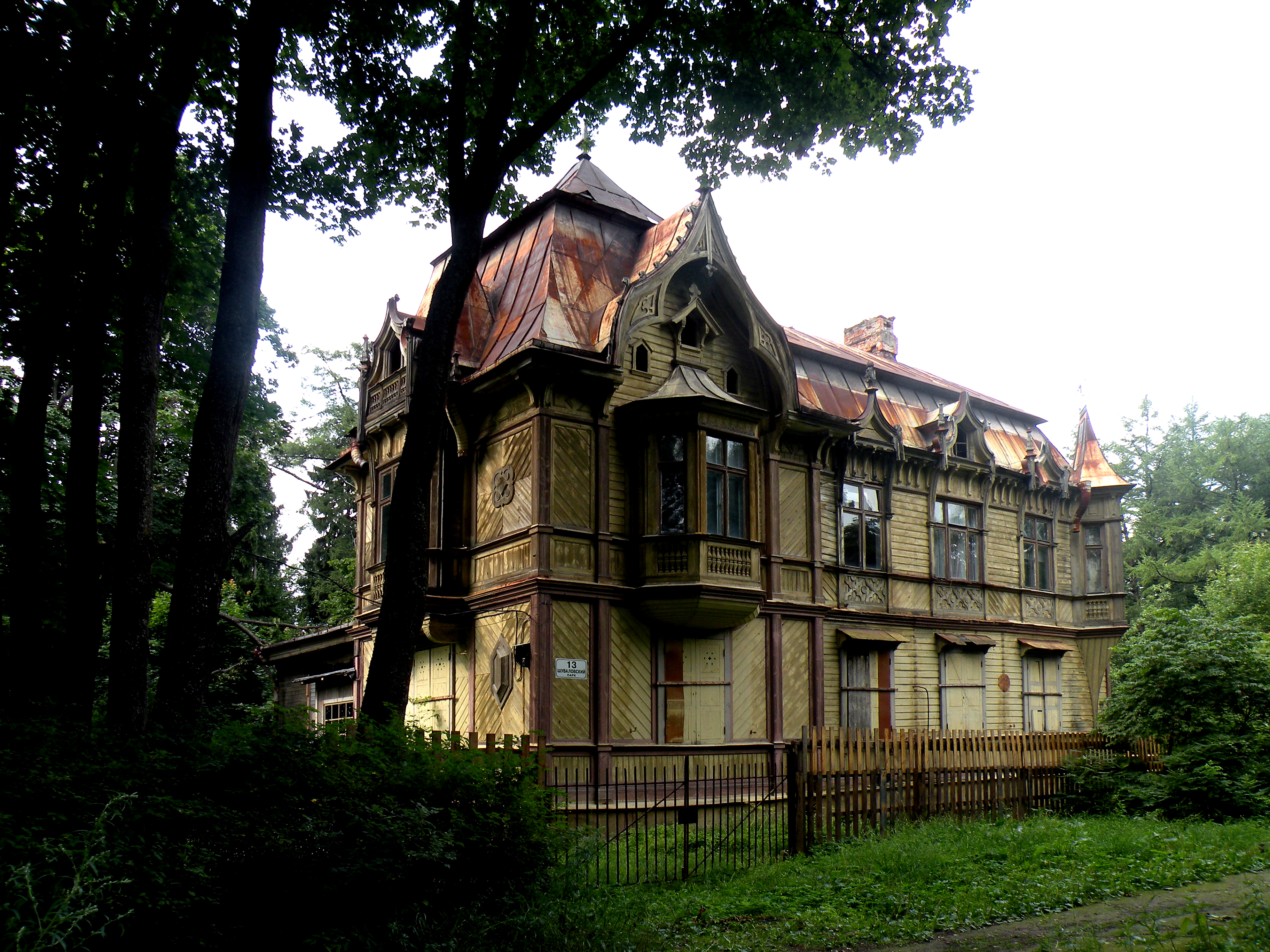 Месмахер Максимилиан Егорович (1842 -1906). Шуалово. Собственная дача.